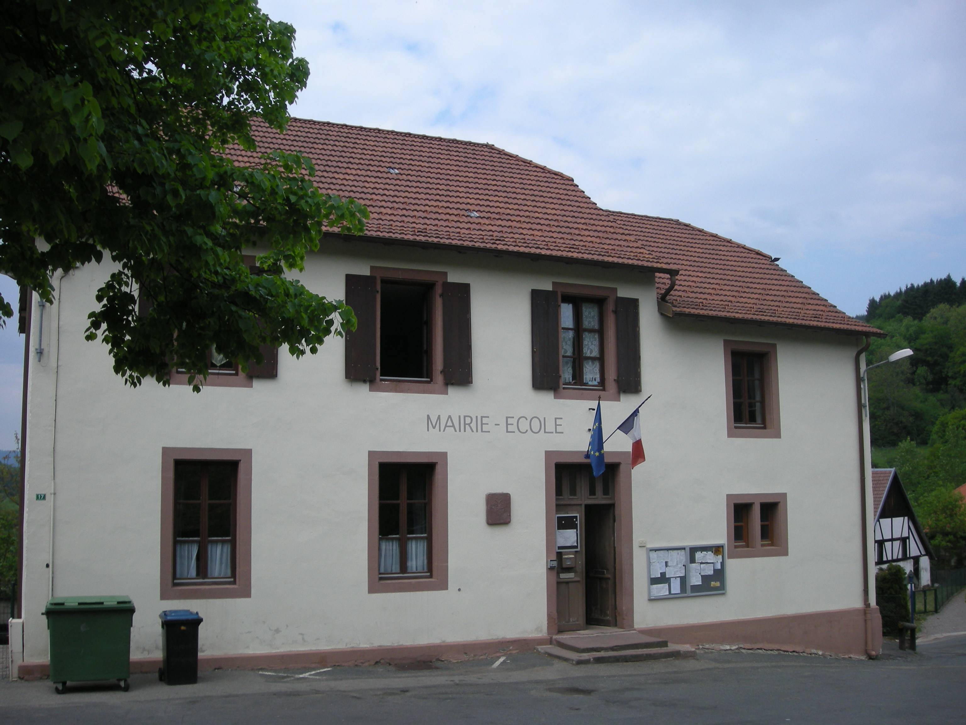 Mairie-école de Waldersbach (Bas-Rhin)